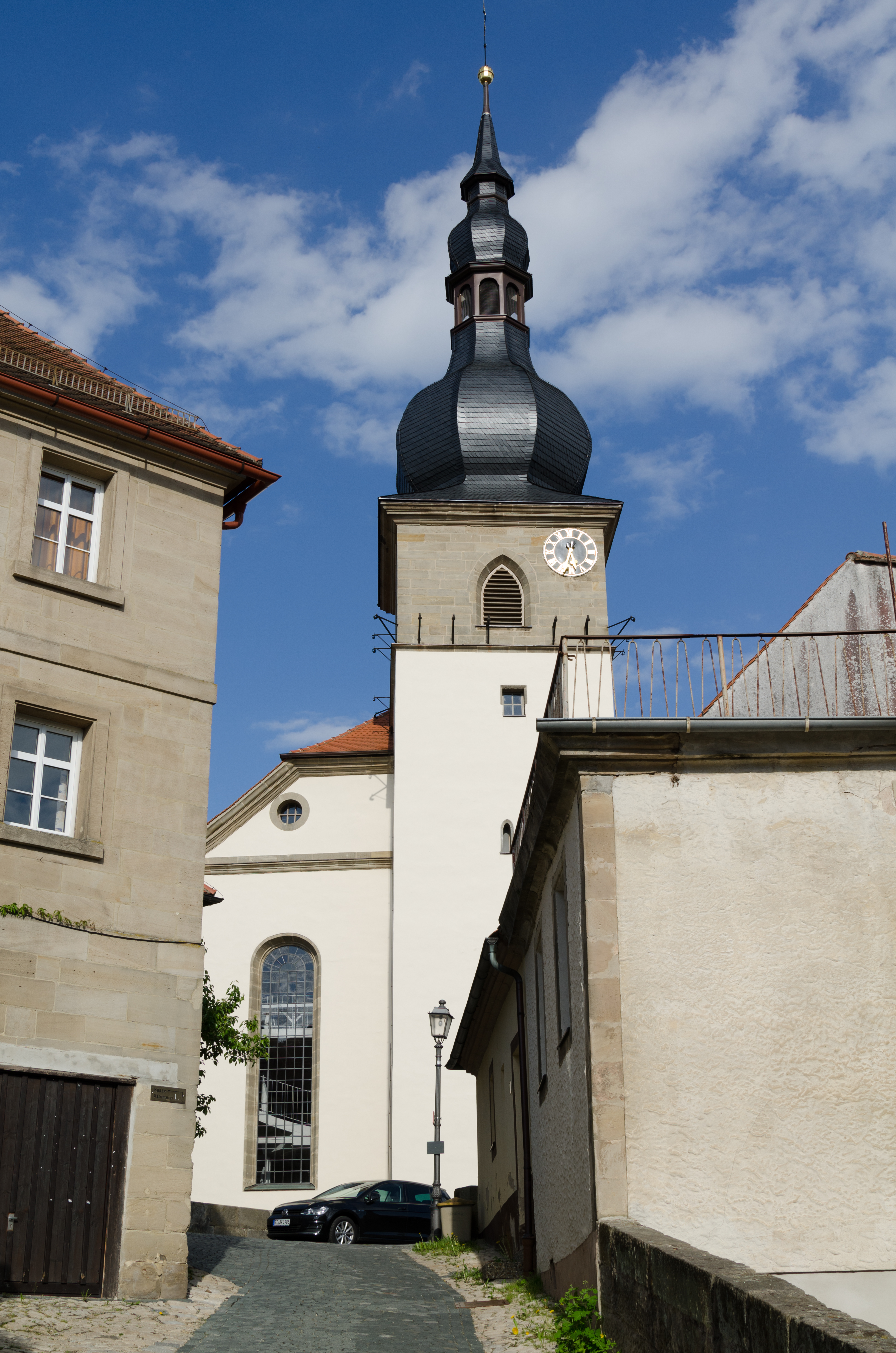 Weidenberg, Gurtstein 13, Ev. Pfarrkirche